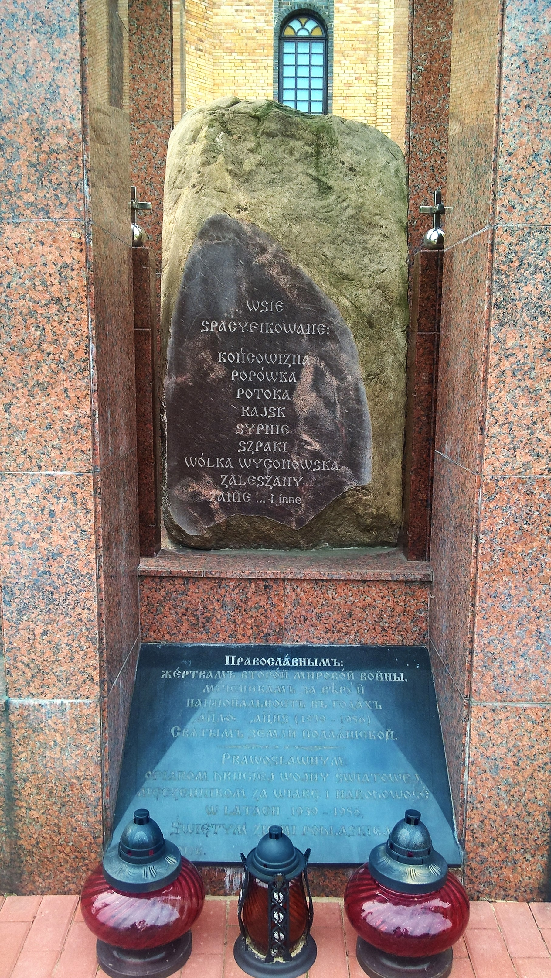 Pomnik prawosławnych mieszkańców Białostocczyzny zabitych i zaginionych w latach 1939–1956. Tablice na pomniku